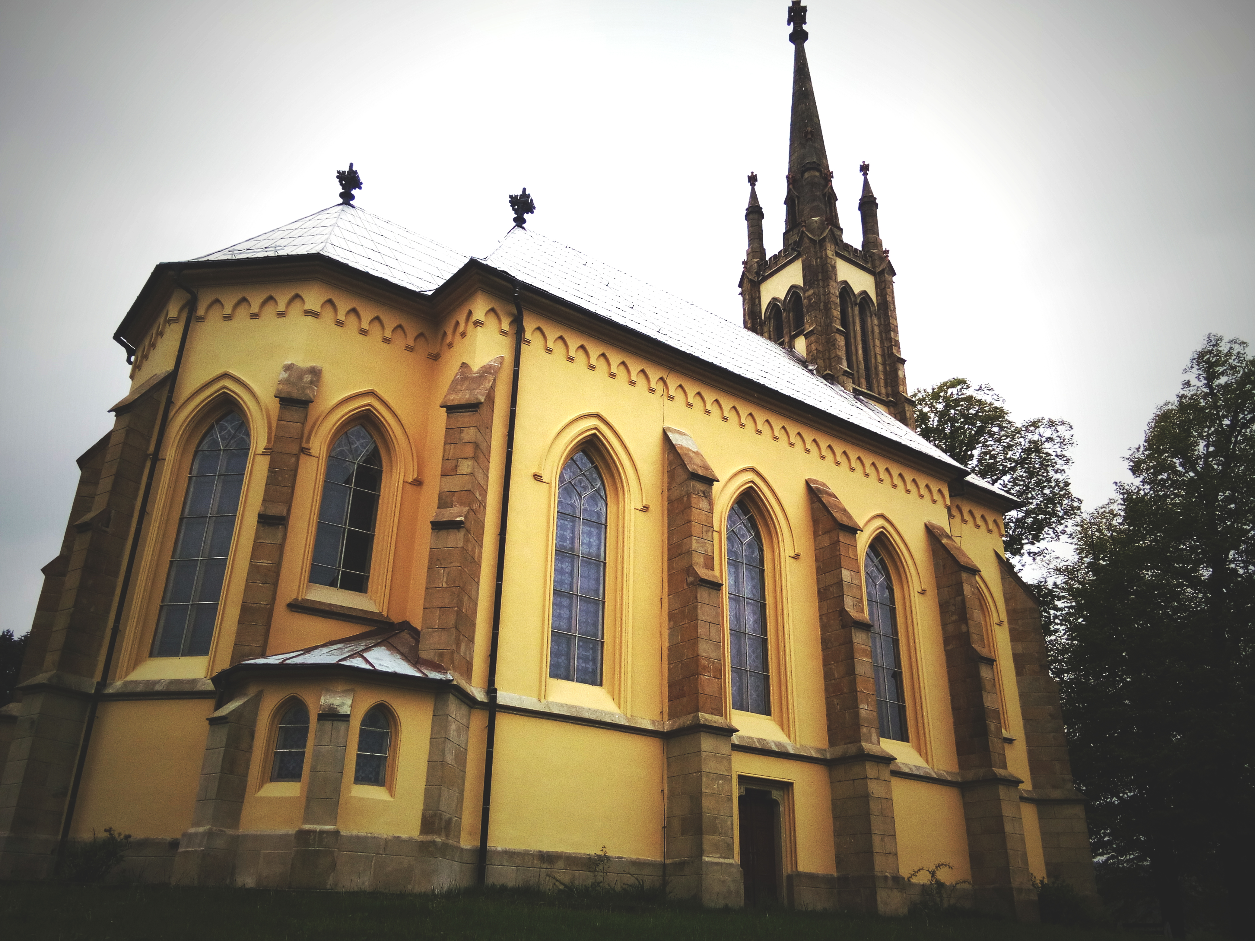 Kostel Cyrila a Metoděje se nachází v Bratřejově (Zlínský kraj). Postaven v novogotickém slohu.